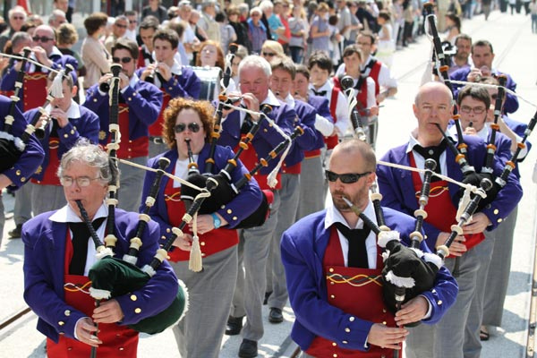 La Kevrenn Brest Sant-Mark lors du Printemps des sonneurs à Brest le 23 avril 2011.